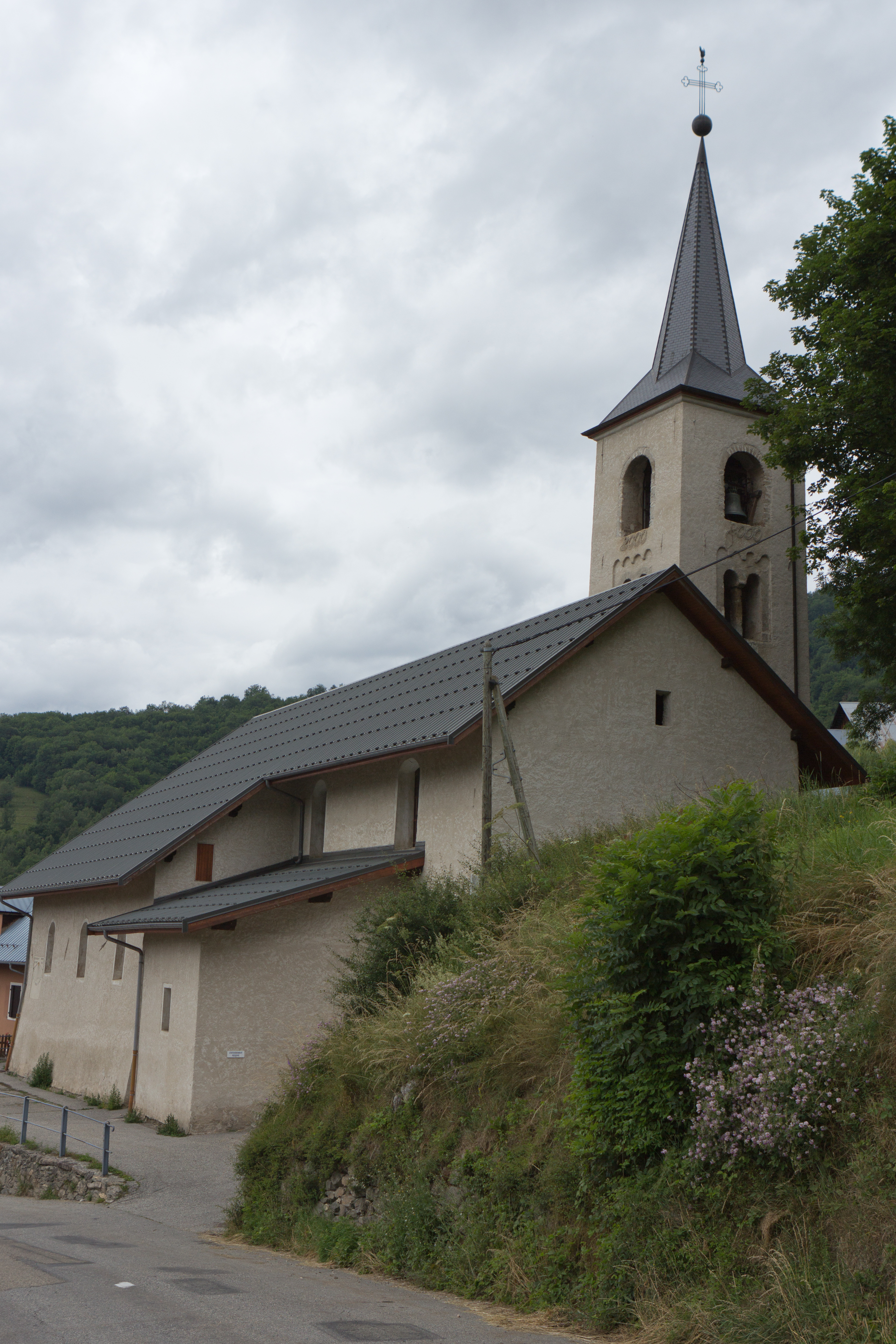 L'église de Montaimont, commune de Montaimont, département de Savoie. France.